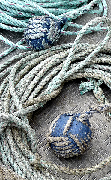 Pommes de Touline des lamaneurs du port de La Pallice. Photo issue de ma banque d'images